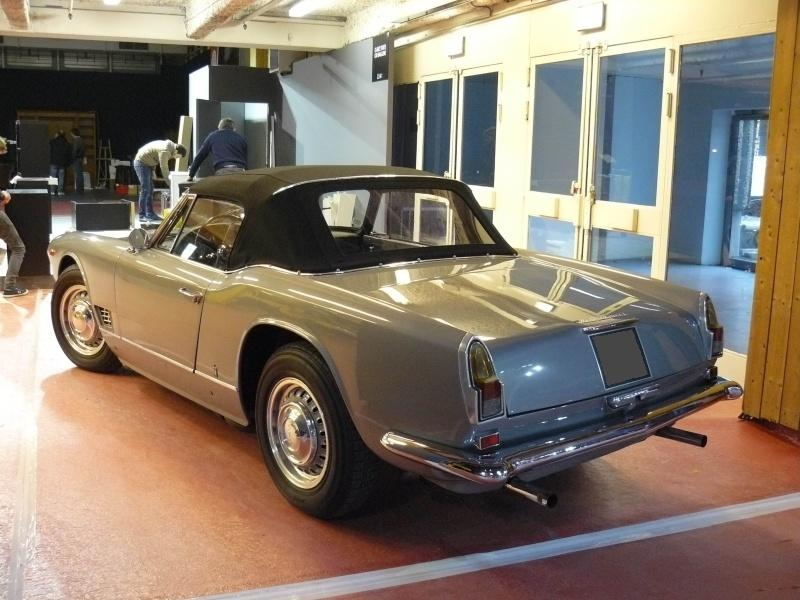 Retromobile 2012